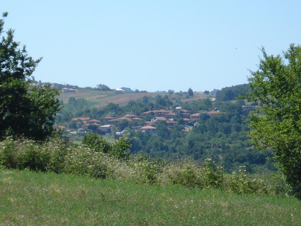 Sucuali, Kandıra